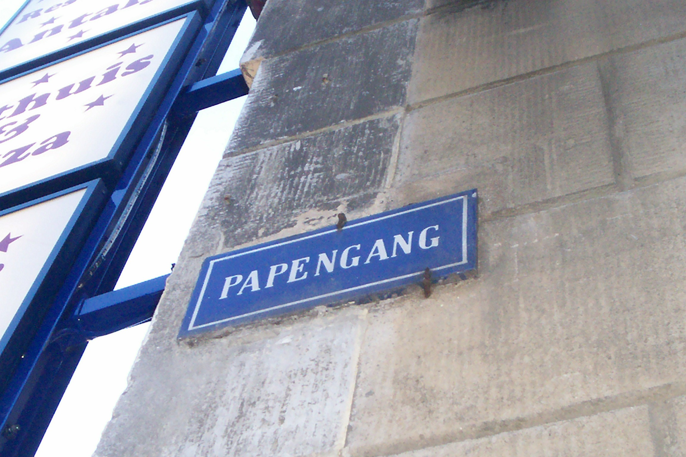 Papengang